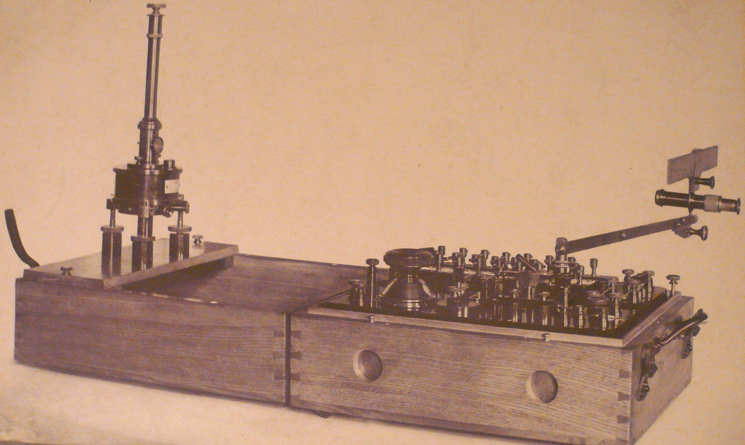 Szvetics Emil 1924-1926 típusú kábelmérő műszere